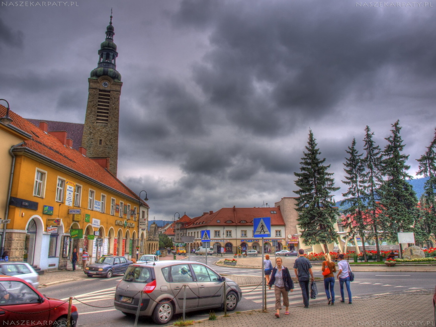 Limanowa